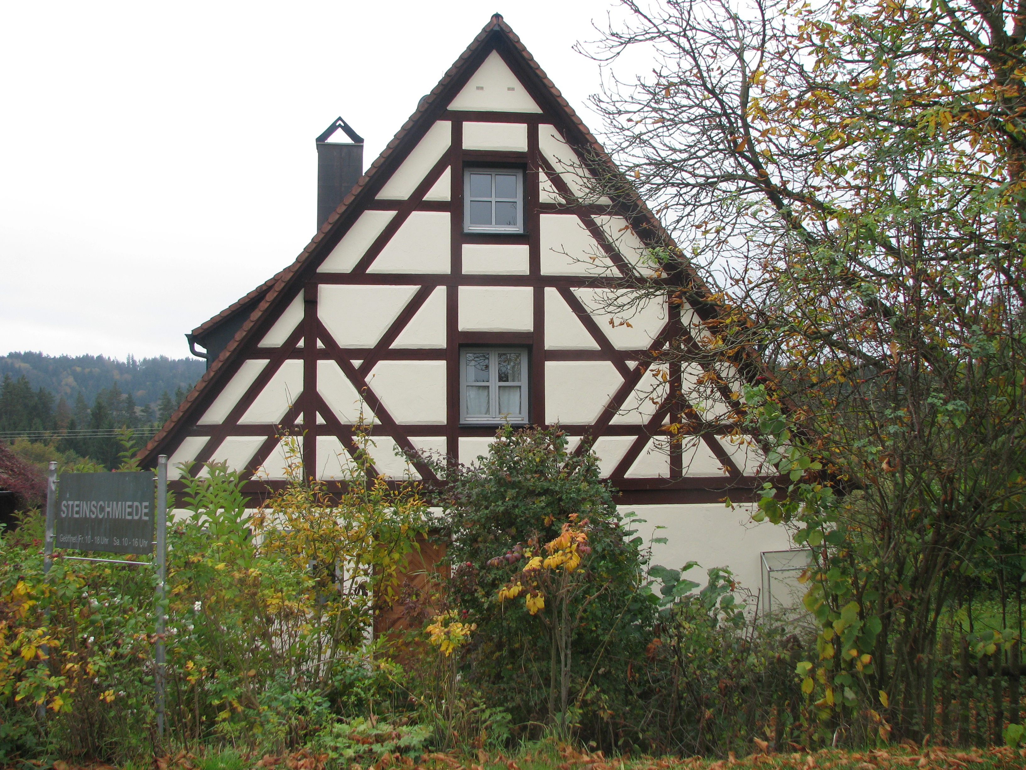 Haslach, Ortsteil von Berg bei Neumarkt in der Oberpfalz, Fachwerkhaus